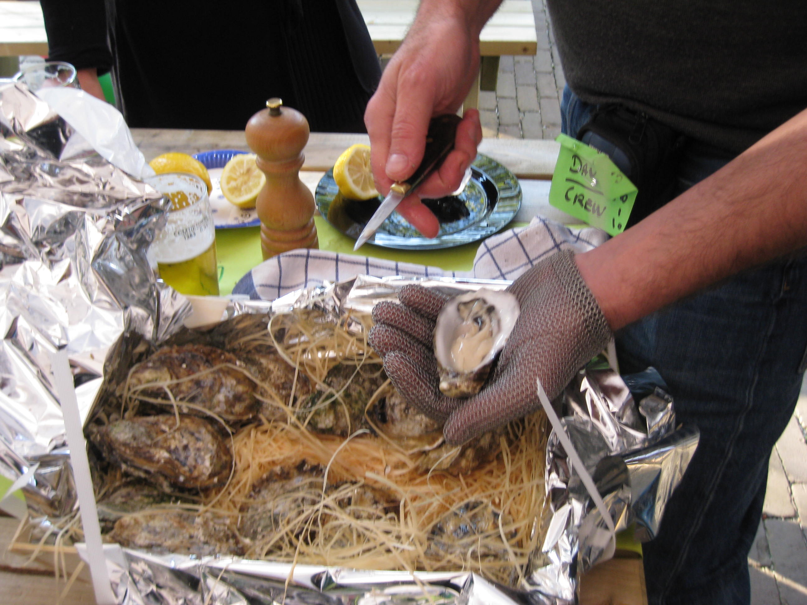 Het openmaken van oesters met oestermes en oesterhandschoen